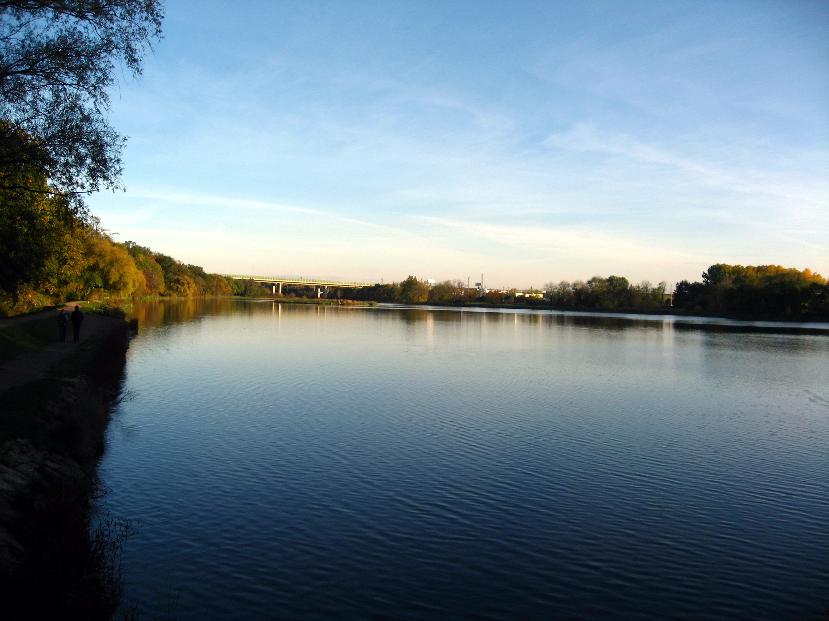 Počernický rybník